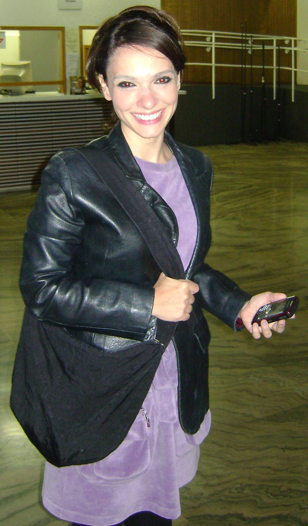 Cynthia Falabella, atriz brasileira, após a apresentação da peça "Toc Toc", no Teatro Gazeta, em São Paulo.